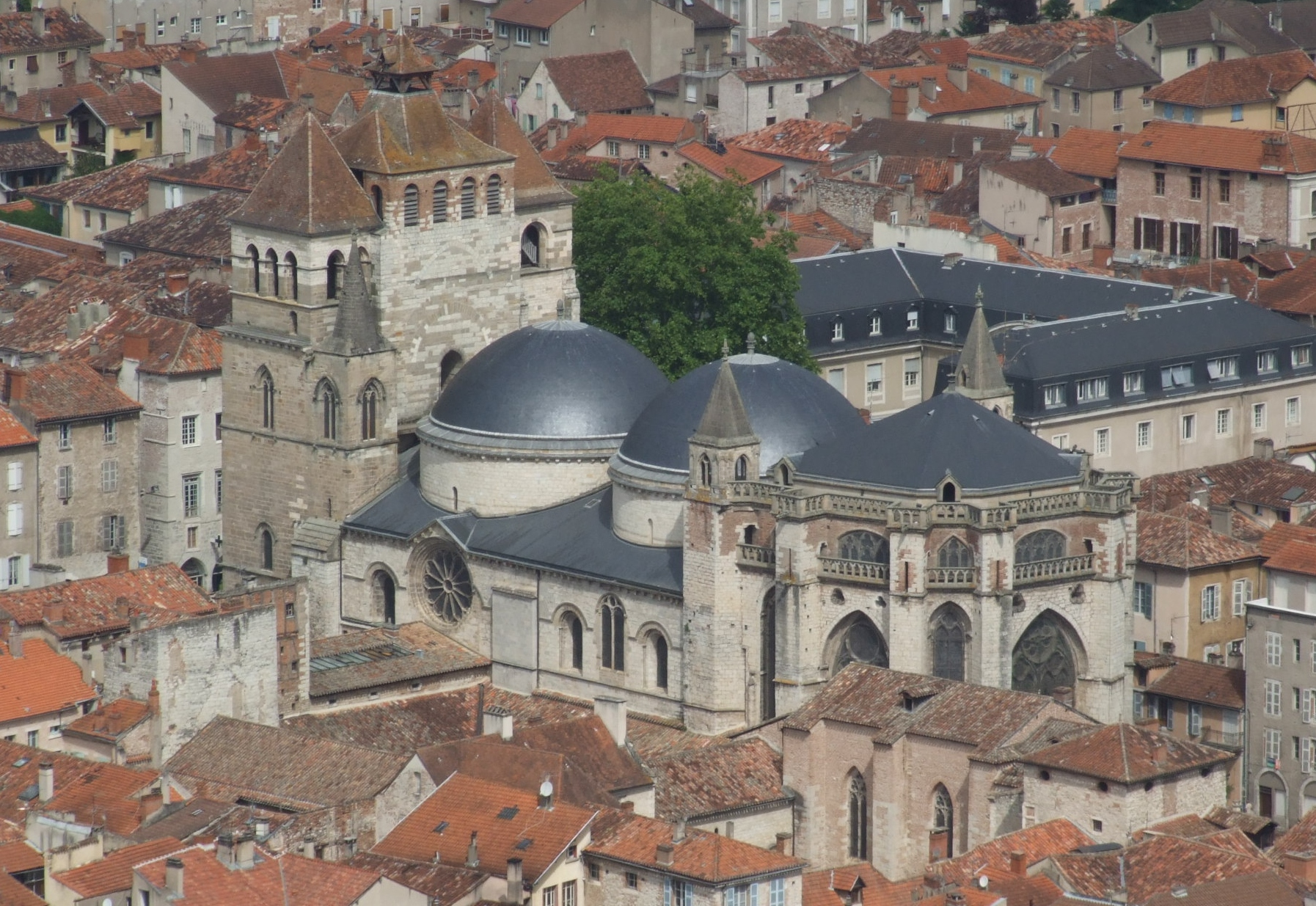 Cathédrale Saint-Étienne de Cahors, vue du mont Saint-Cyr, Cahors, Lot, FRANCE